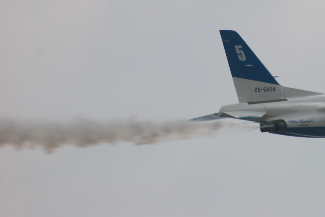 スモークはここから出ています。